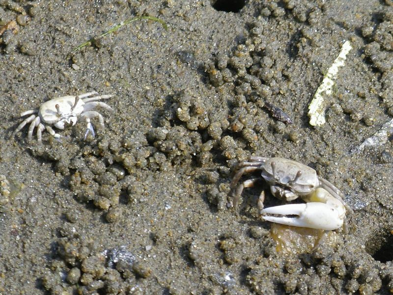 ハクセンシオマネキ, 長崎県西海市 (Uca lactea, Saikai, Nagasaki)